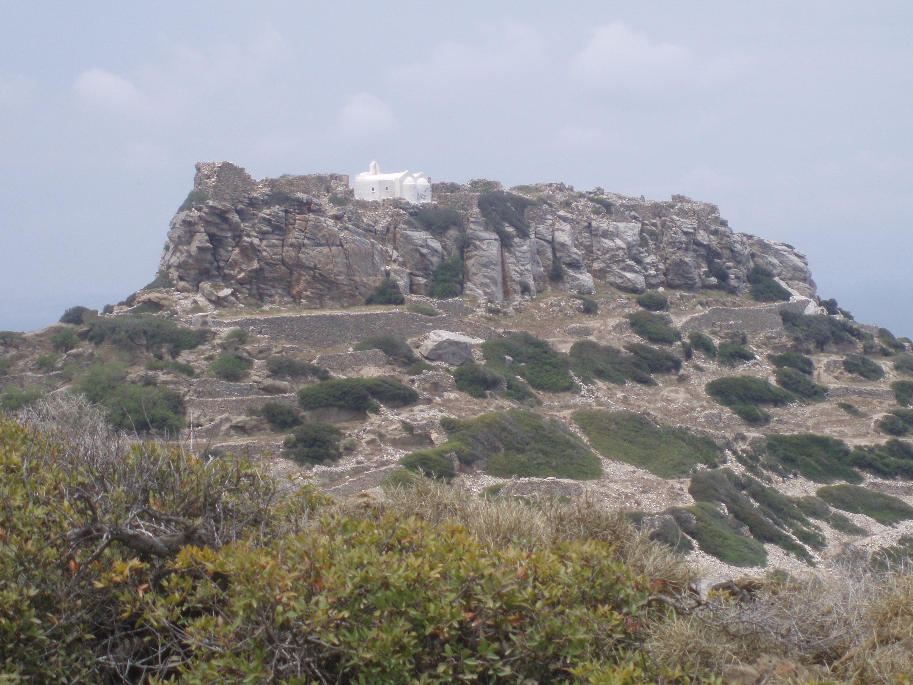 face nord de l'acropole d'Arkesini, île d'Amorgos